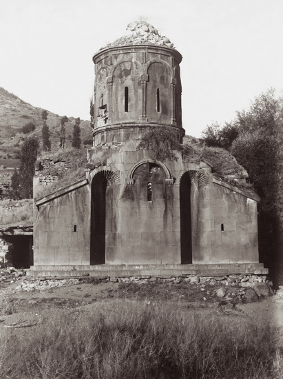 ექექი - 1917 ე. თაყაიშვილის ექსპედიცია